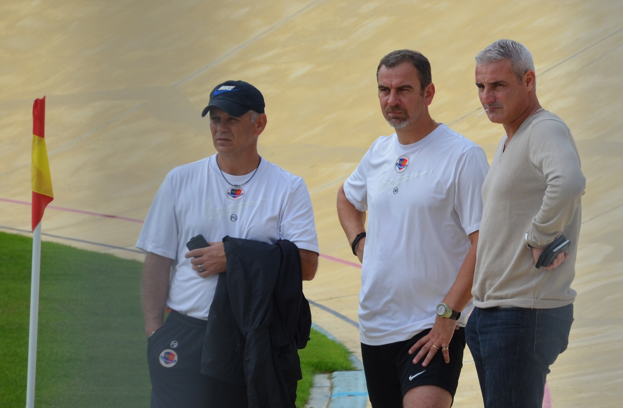 Patrice Garande (entraîneur), Jean-Marie Huriez (entraîneur adjoint) et Alain Caveglia (directeur sportif) photographiés lors d'un match amical de la réserve du Stade Malherbe de Caen face au Stade rennais.